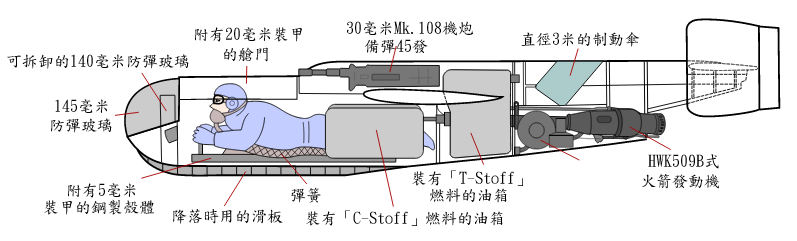 阿拉多E.381的結構圖